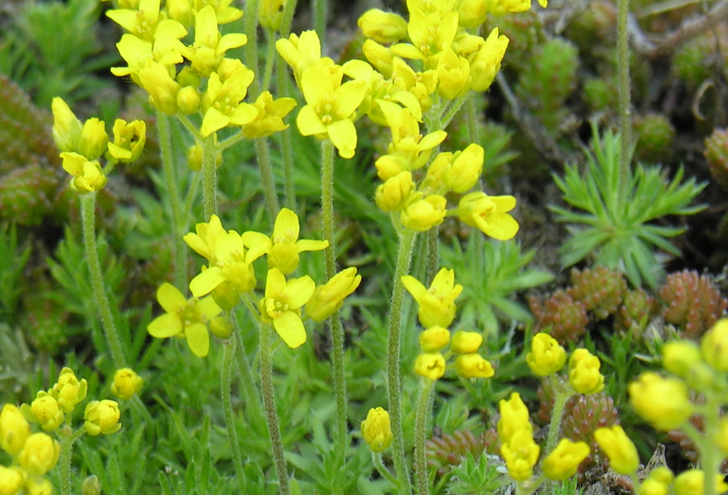 Geltonžiedės uolaskėlės žiedai (Saxifraga x apiculata) Šeima. Uolaskėliniai (Saxifragaceae) Fotografavo: Algirdas, 2006 m. gegužės 3 d.